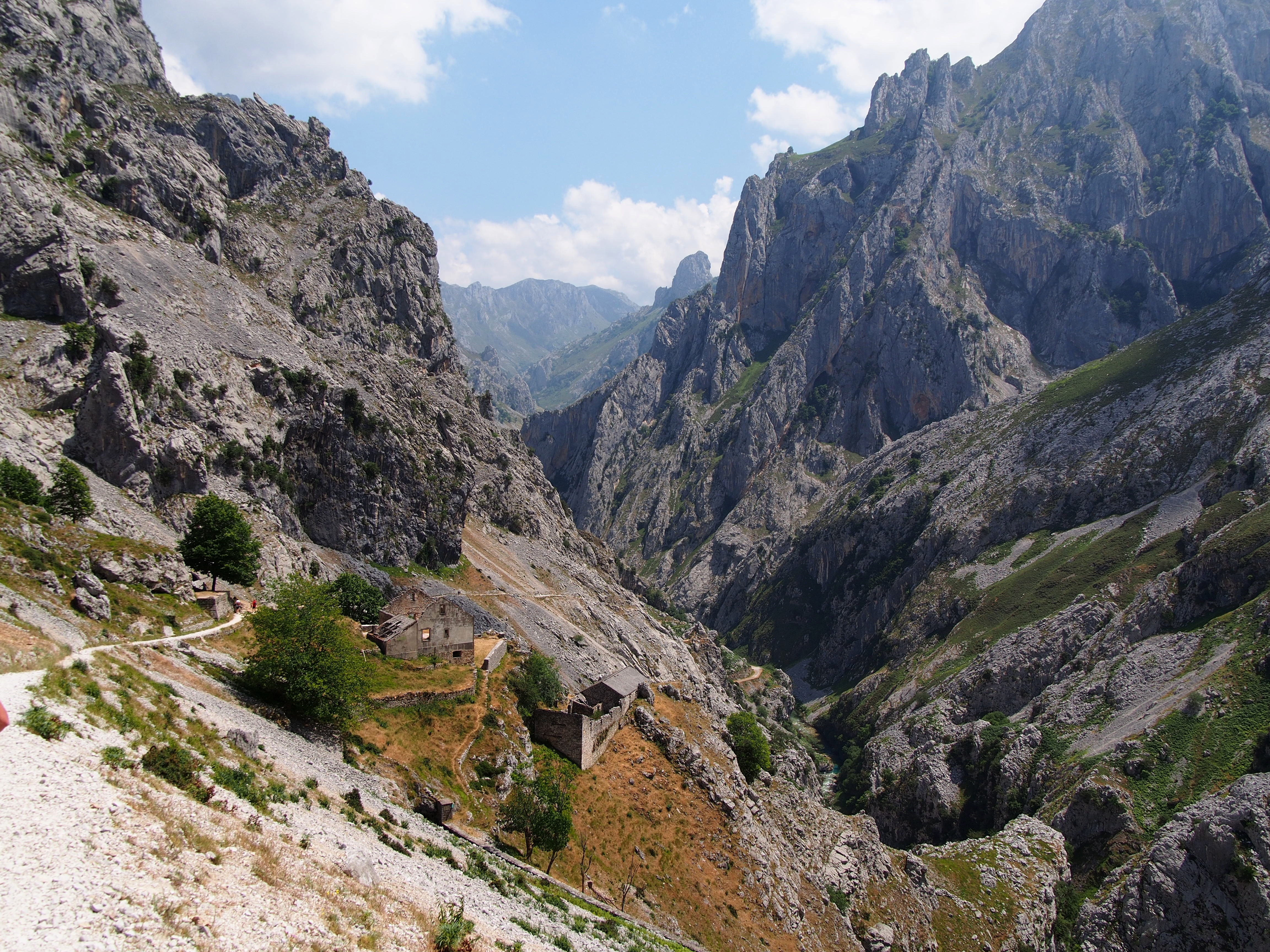 Picos de Europa - 2013.07